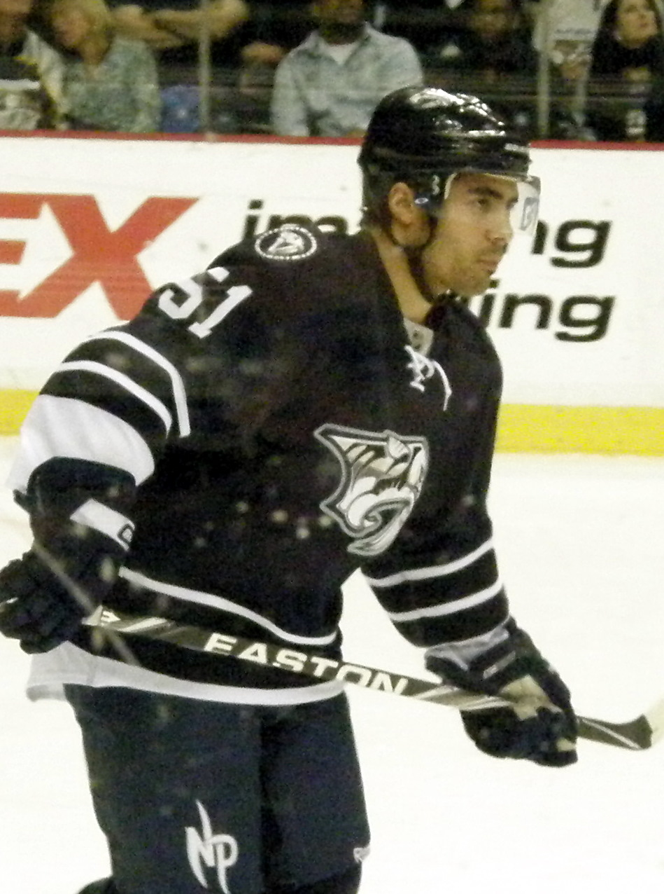 Francis Bouillon